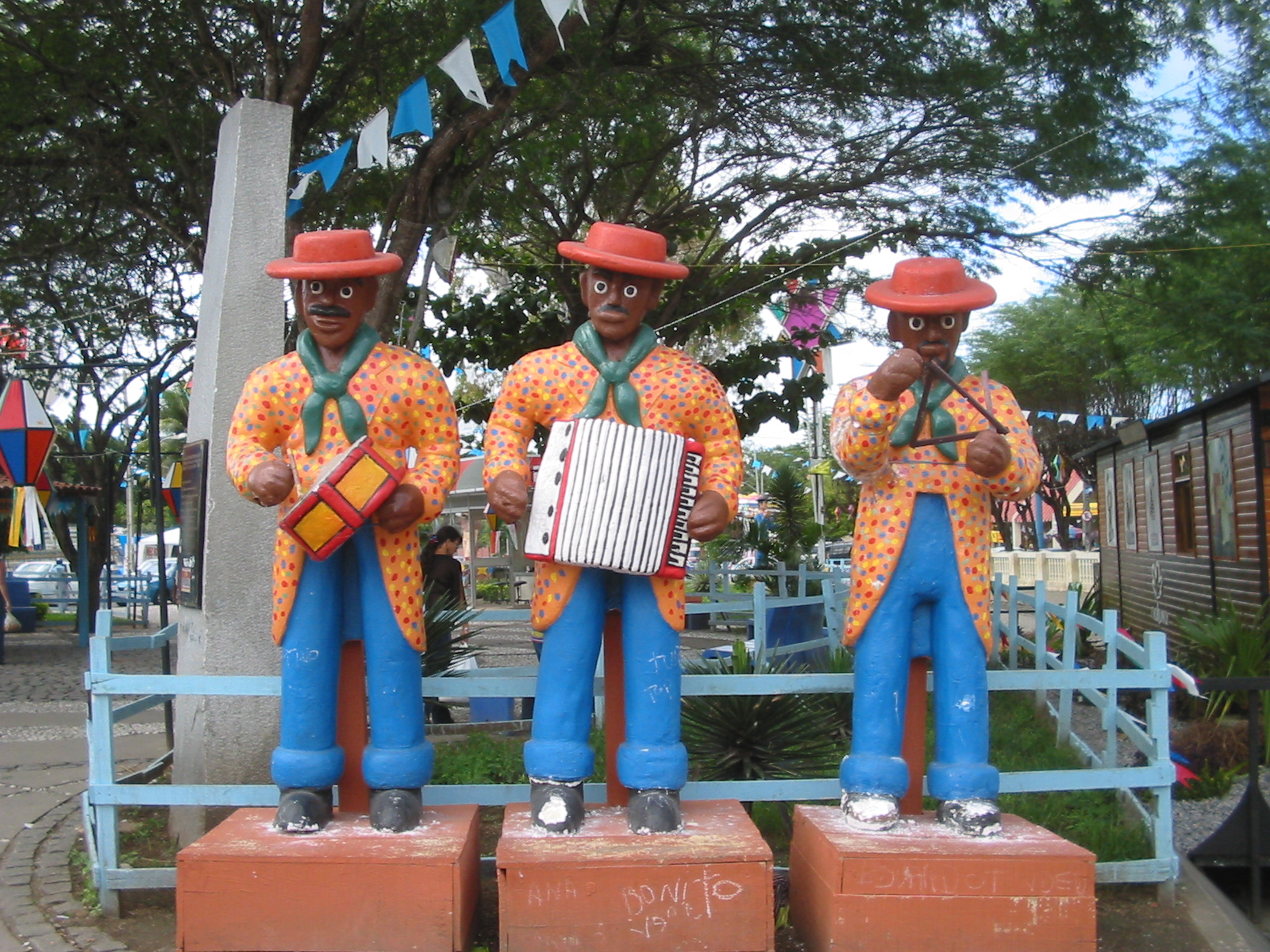 Caruaru (Pernambuco), Brasil. Típico trio de forró pé-de-serra: zabumba, sanfona e triângulo. Caruaru (Pernambuco), Brazil. Forró musicians.